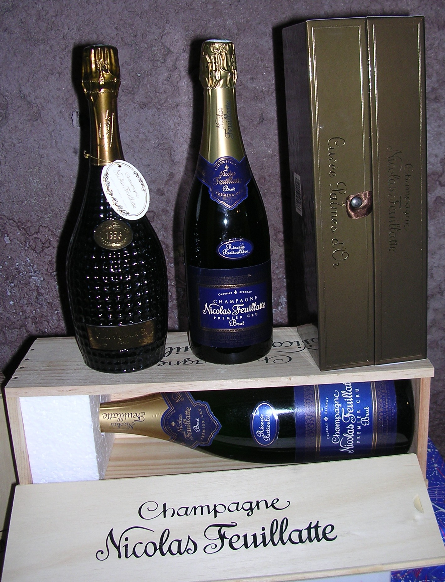 Quelques bouteilles du Champagne Nicolas Feuillatte : Cuvée "Palmes d'Or", Cuvée "Réserve Particulière", emballage de la cuvée "Palmes d'Or", sur un magnum "Réserve Particulière" en caisse bois.